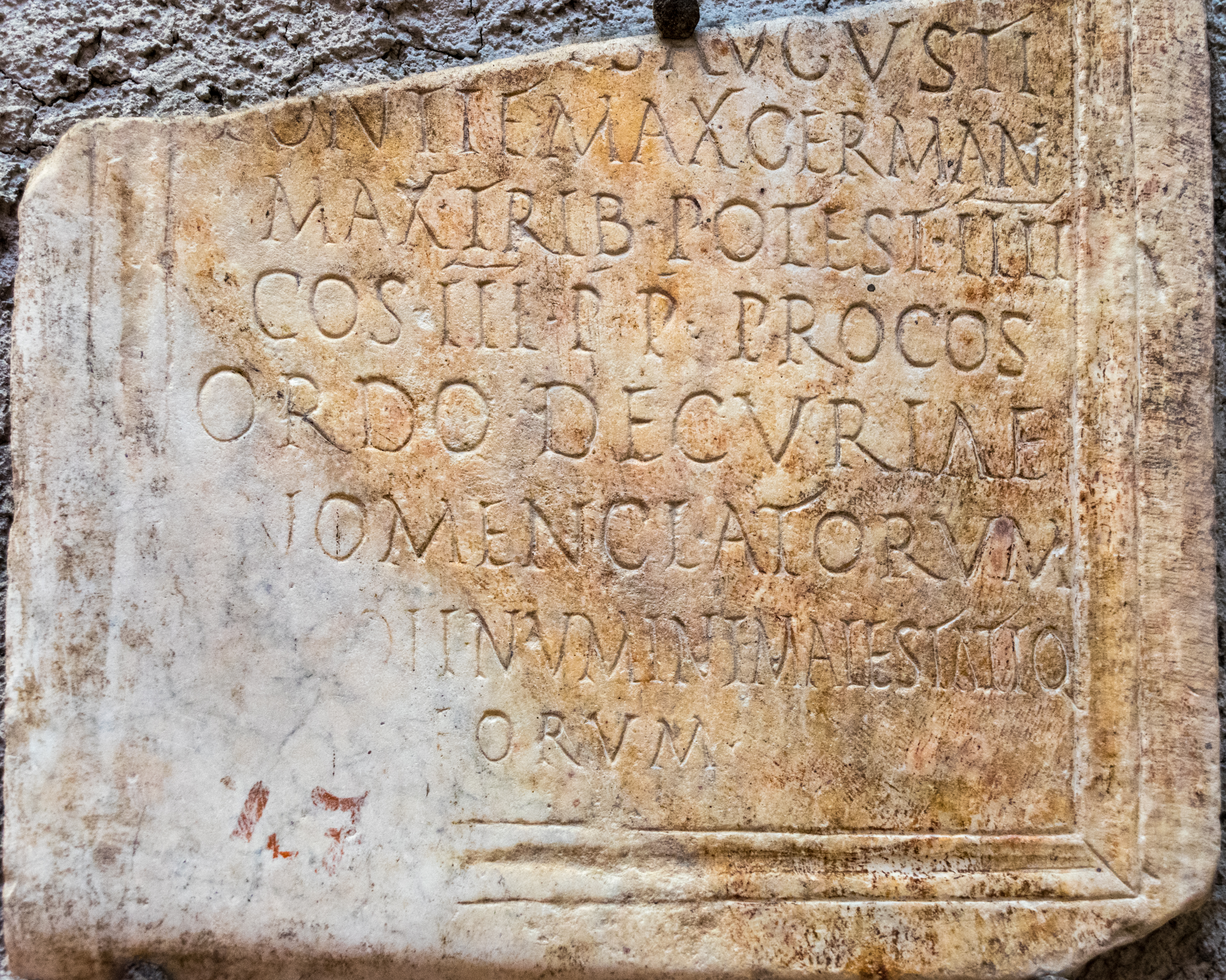 Ehreninschrift des Valerianus Caesar um das Jahr 255 n. Chr. – 256 n. Chr. (CIL 06, 40702), die in Rom am Stadion des Domitian (Piazza Navona) gefunden wurde